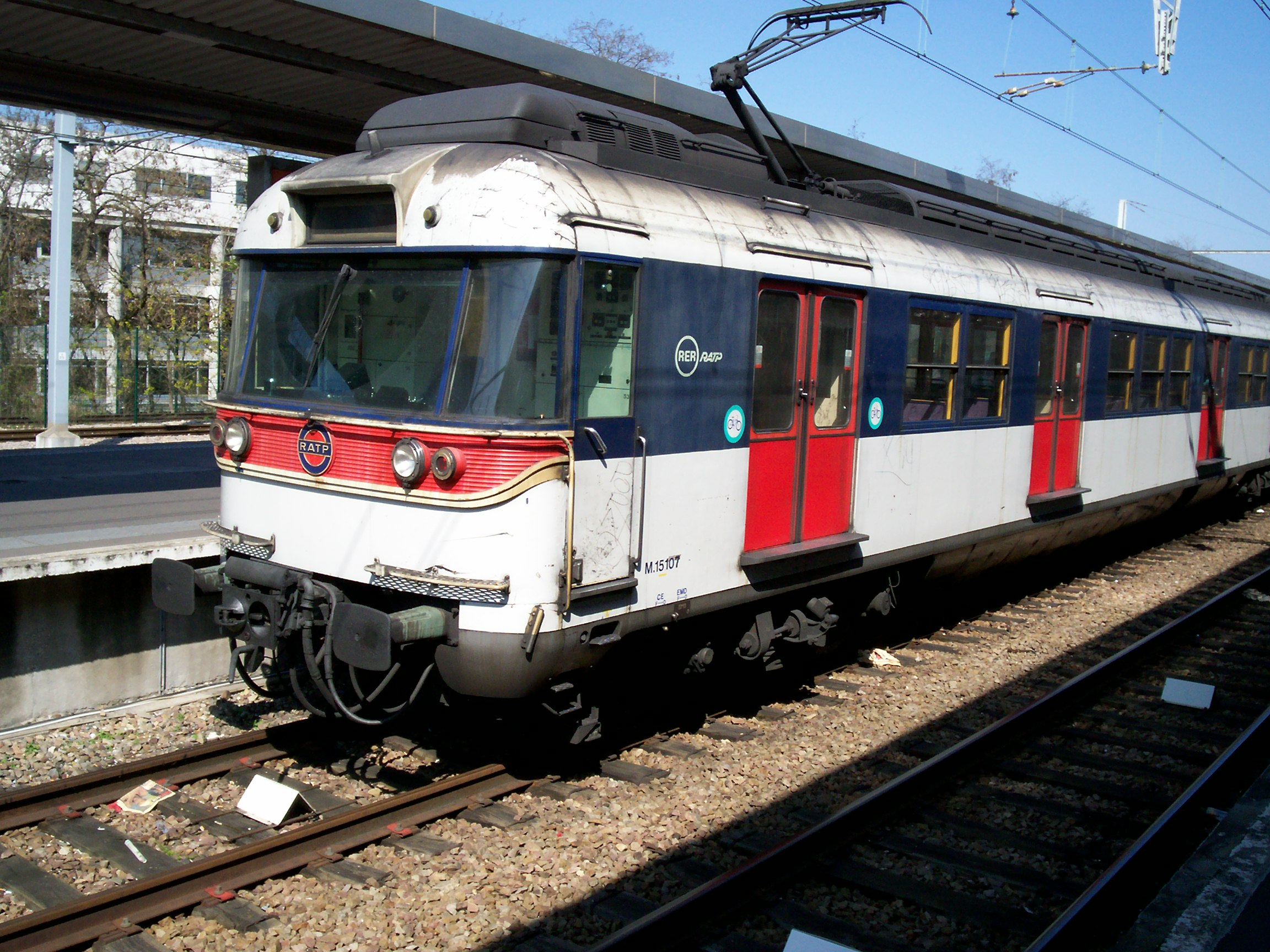 MS61 à Rueil-Malmaison